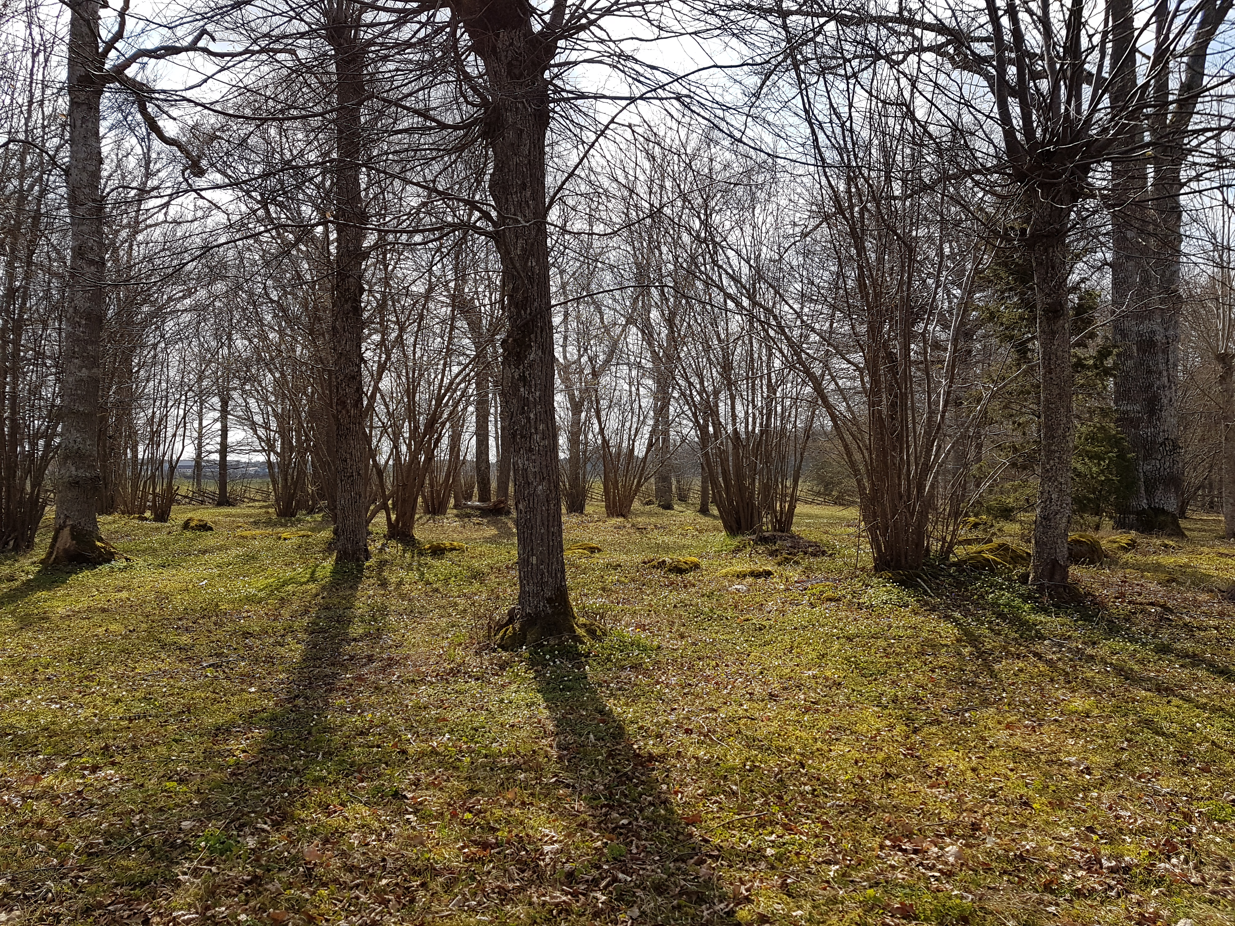 Husgrund RAÄ nr Vallstena 57:1